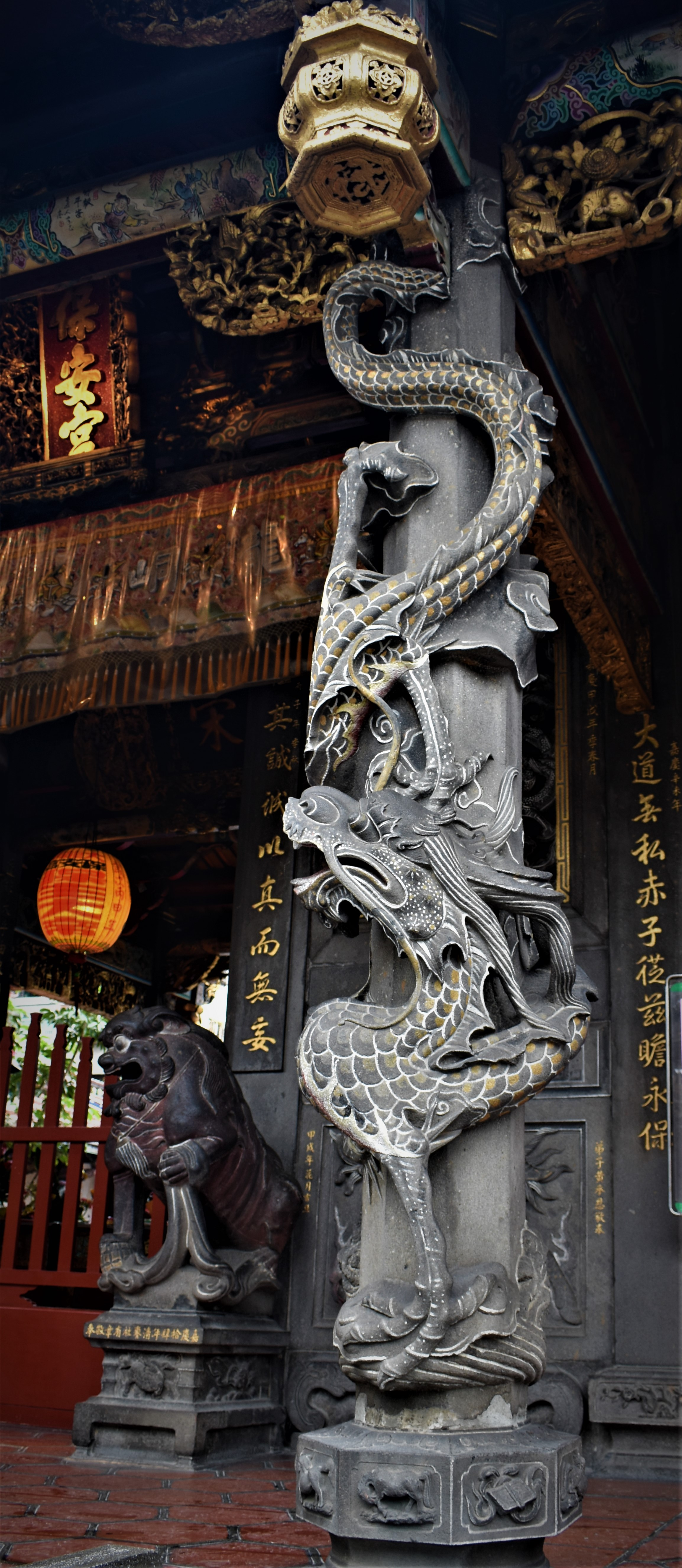 中文（台灣）: 大龍峒保安宮最古老的龍柱